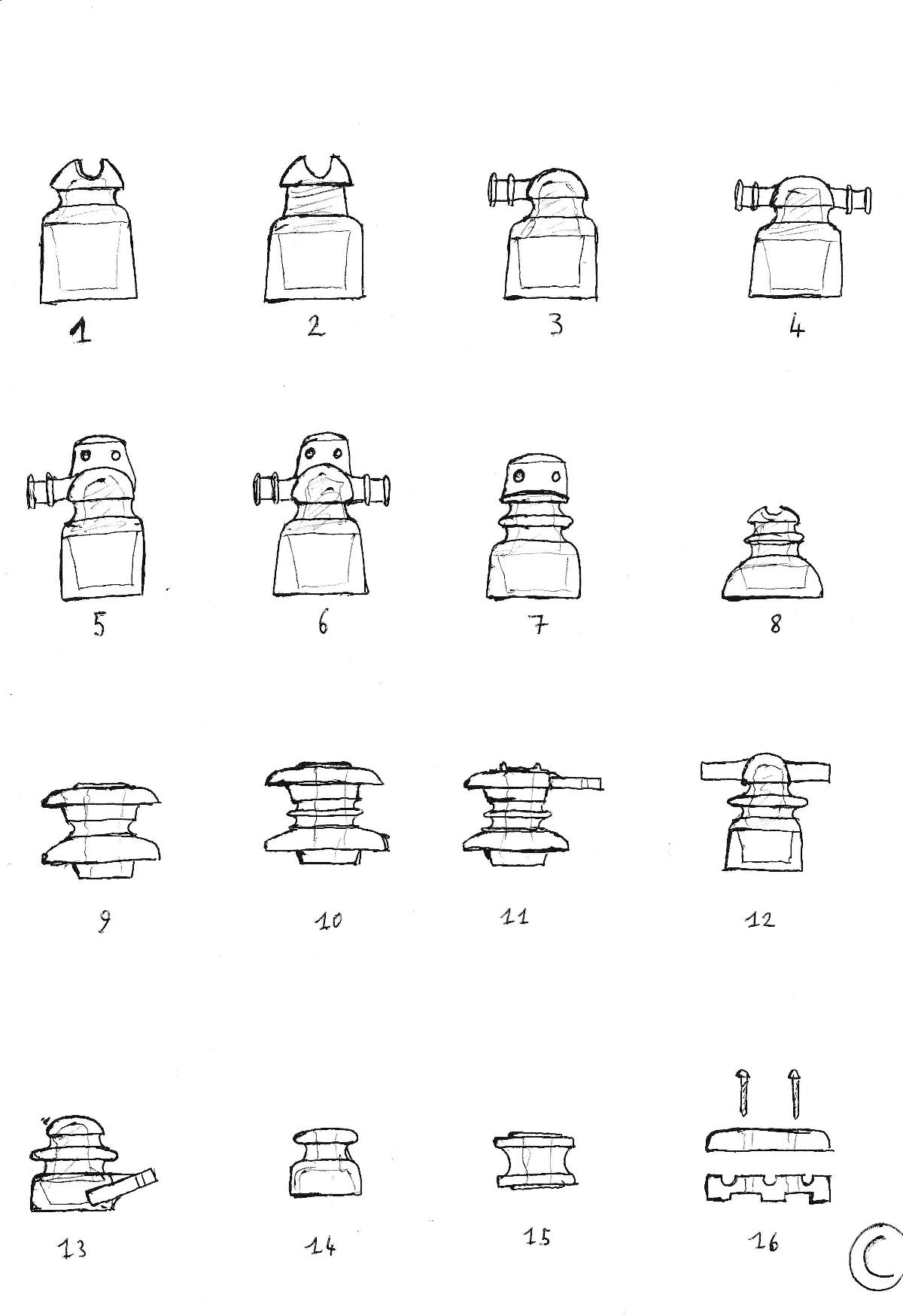 Croquis montrant les différents types d'isolateurs utilisés en basse-tension au cours du XXe siècle.